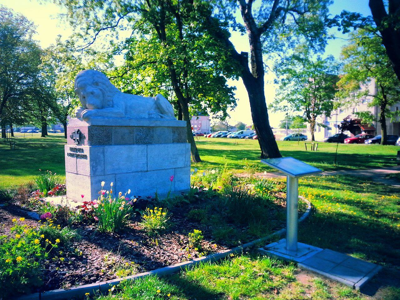 Park Lwa